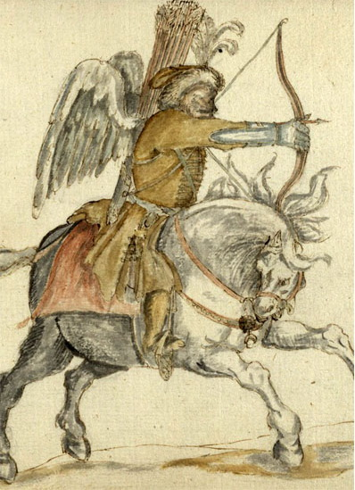 Польский элеар, рисунок дипломата Абрахама [ван] Боота.